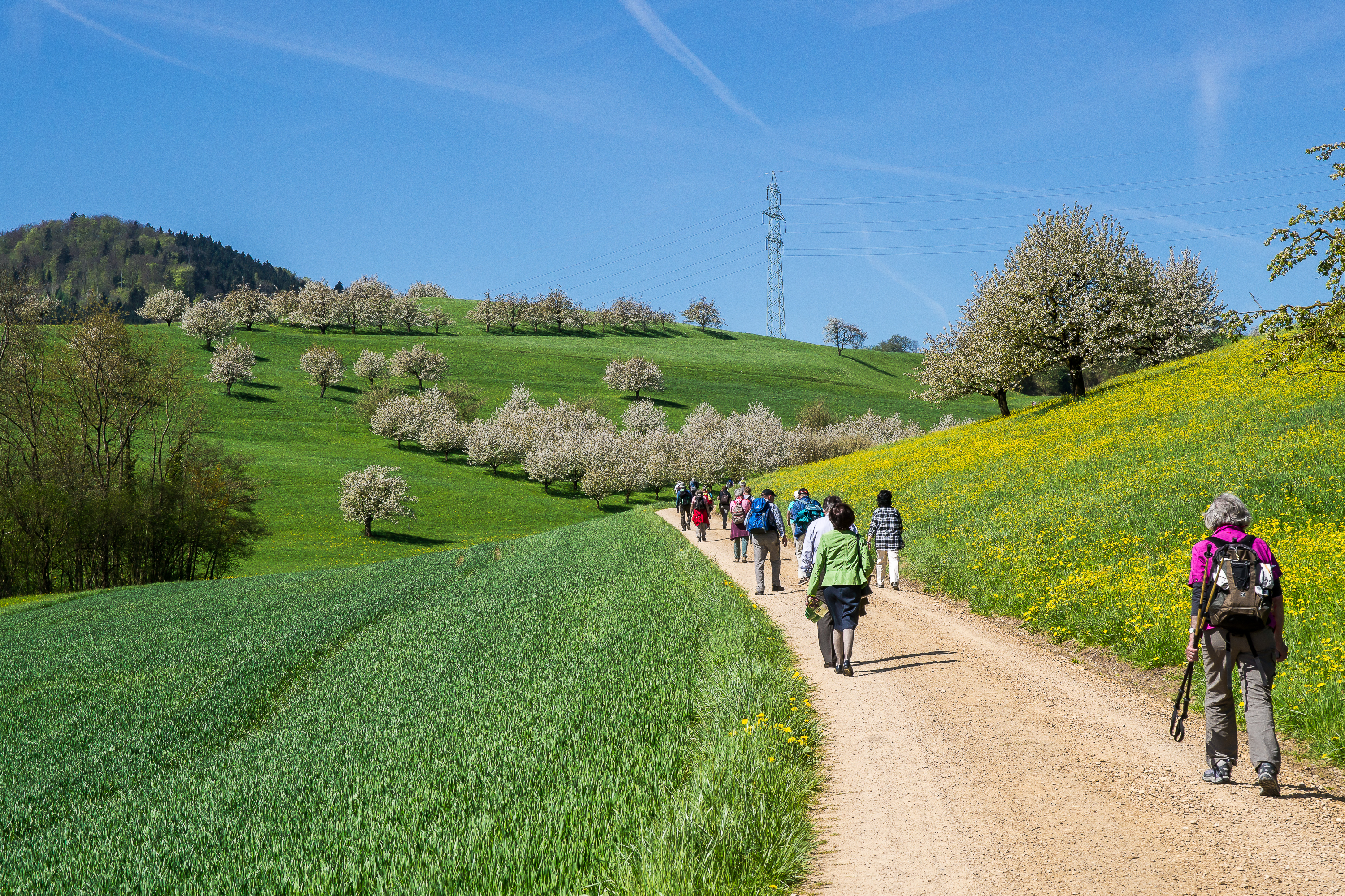 Jurapark Aargau, im Fricktal während der Kirschblüte im April